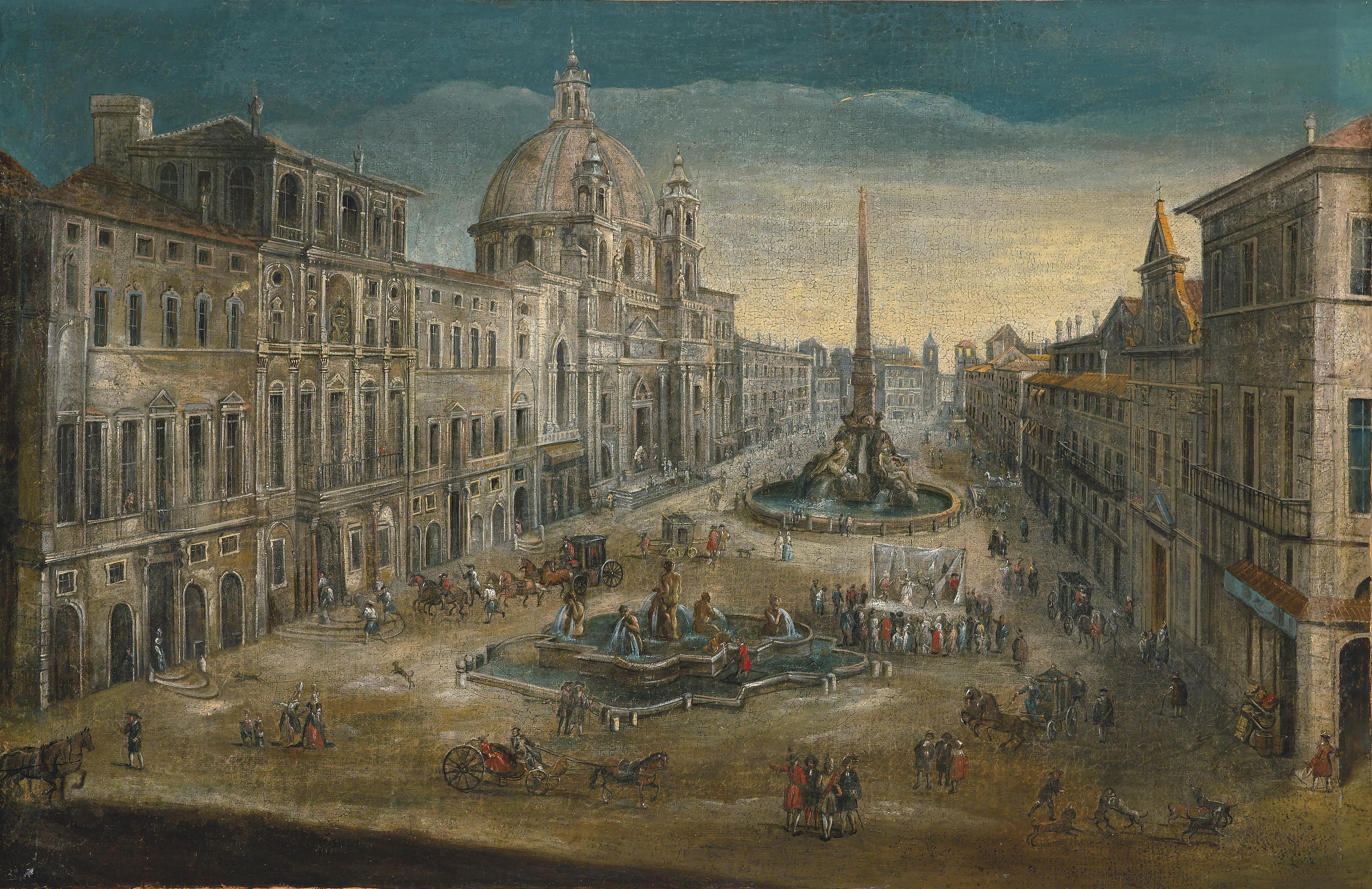 Ansicht der Piazza Navona in Rom, Öl auf Leinwand, 61 x 93 cm. Römische Schule des 17. Jahrhunderts